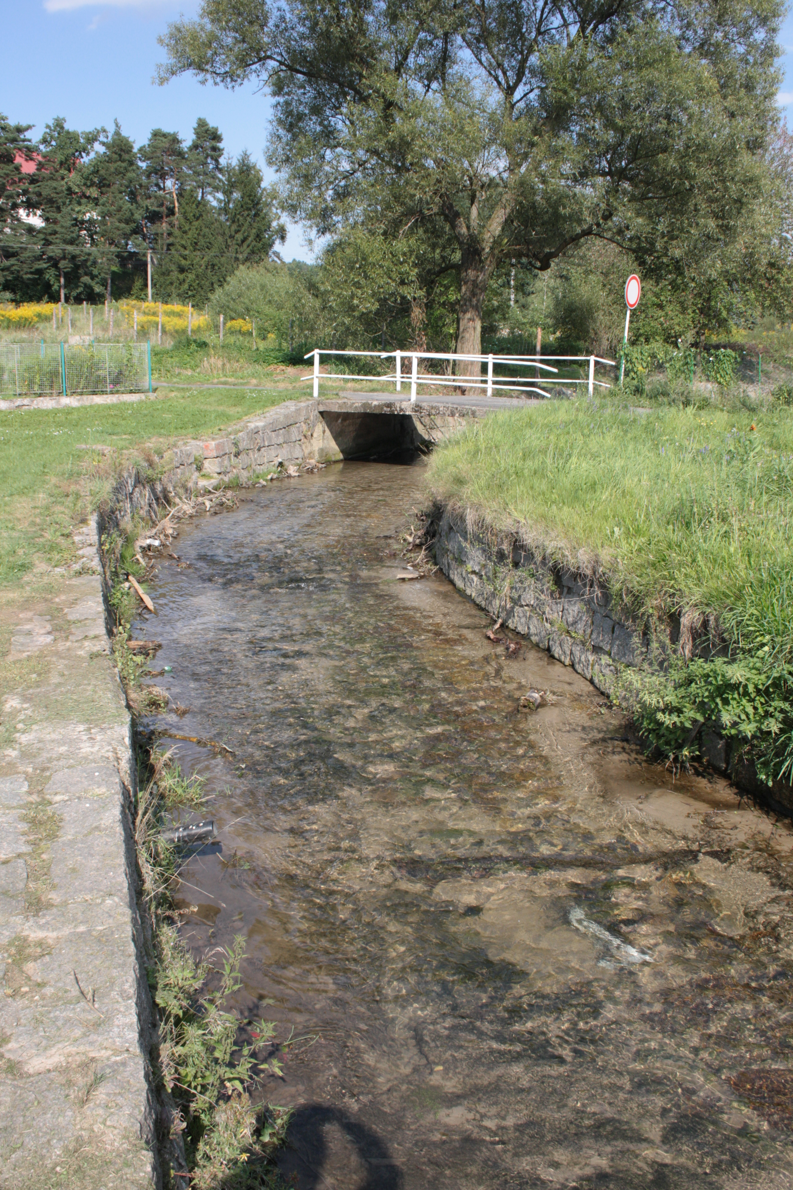 Bulovský potok v Arnolticích.